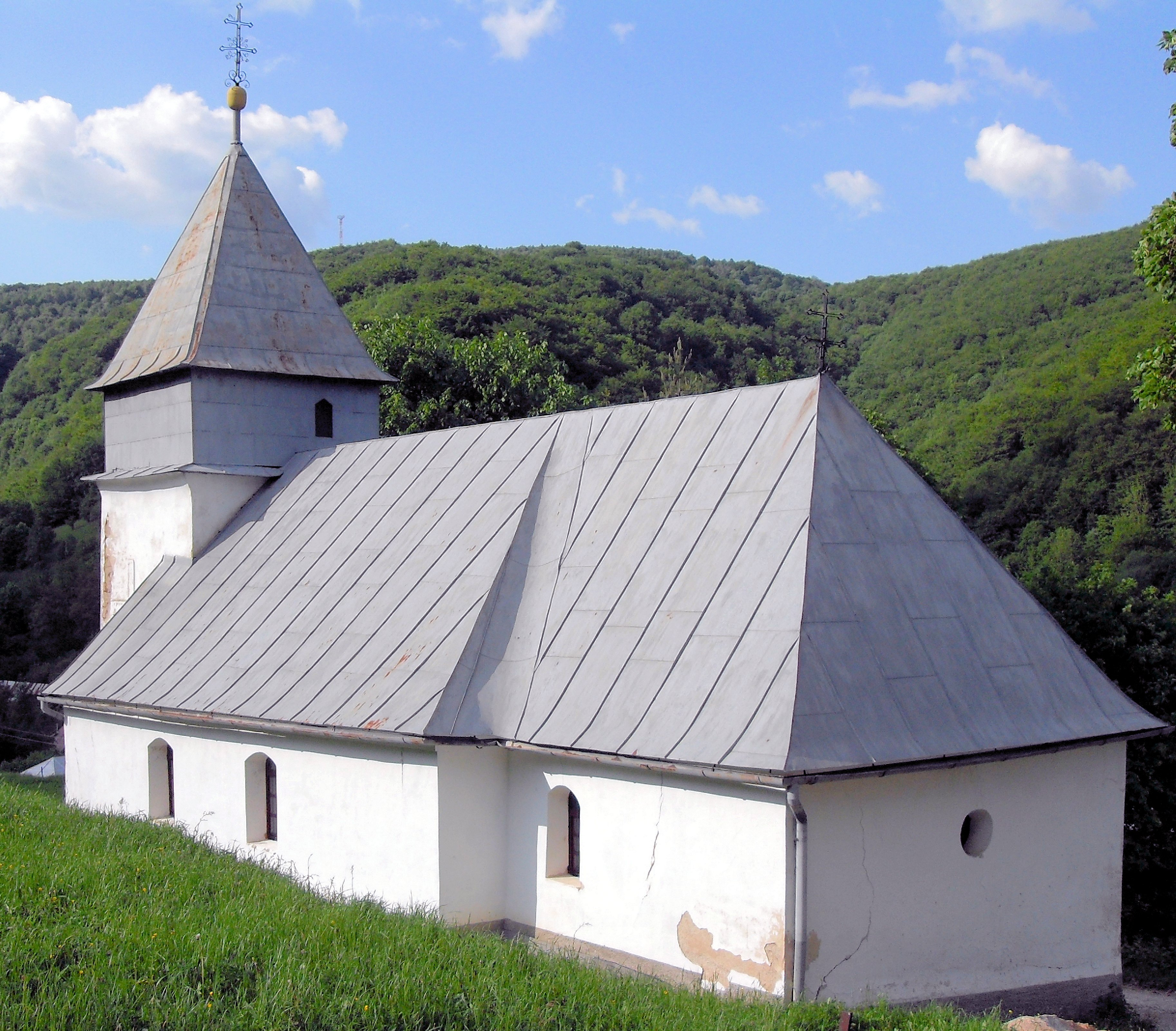 Gréckokatolícky kostol Narodenia Presvätej Bohorodičky Hačava